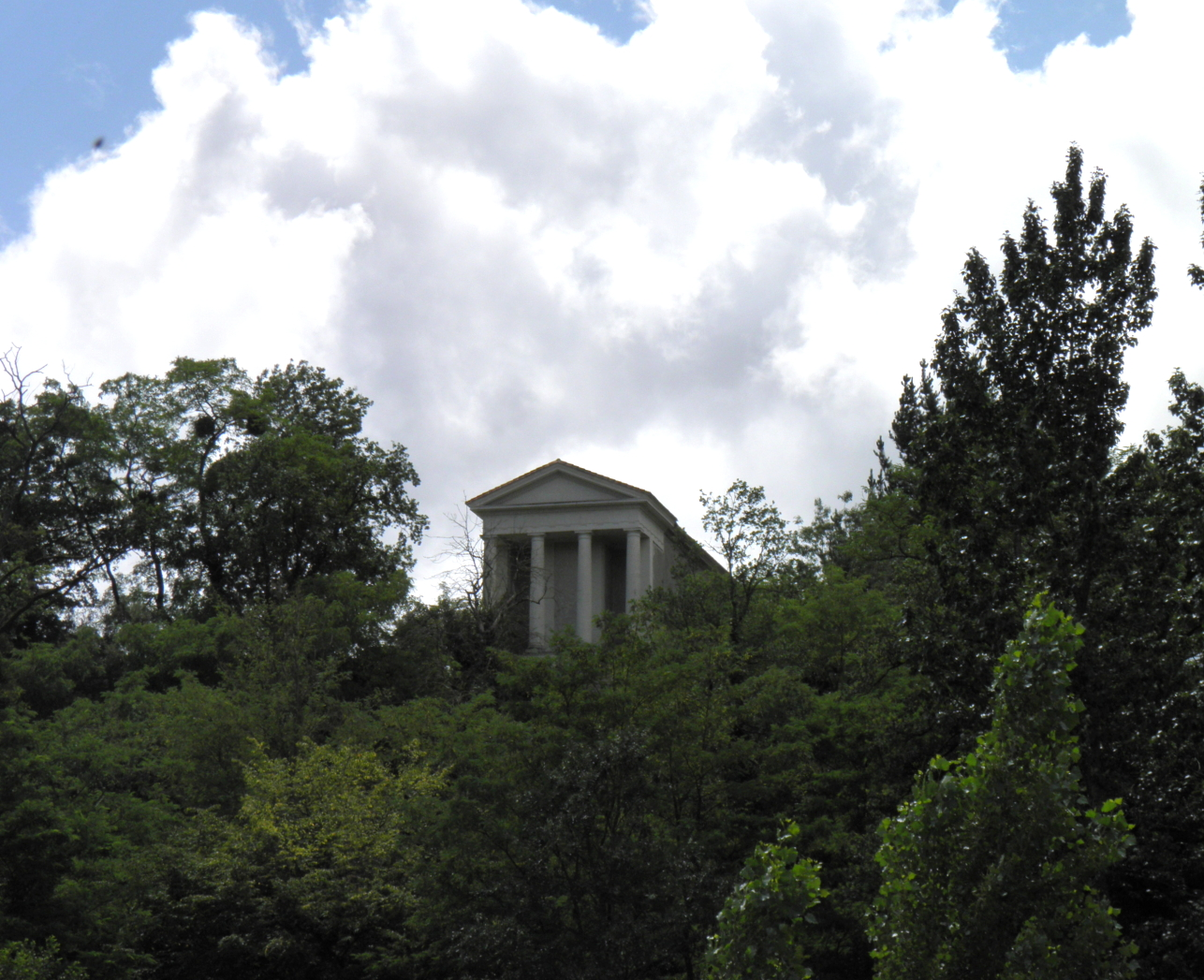 Temple de l'amitié situé dans le cimetière de Clisson, vu depuis la terrasse de la villa. Monument funéraire de Frédérique Lemot. La Garenne Lemot, Gétigné - Clisson, Loire-Atlantique, France.